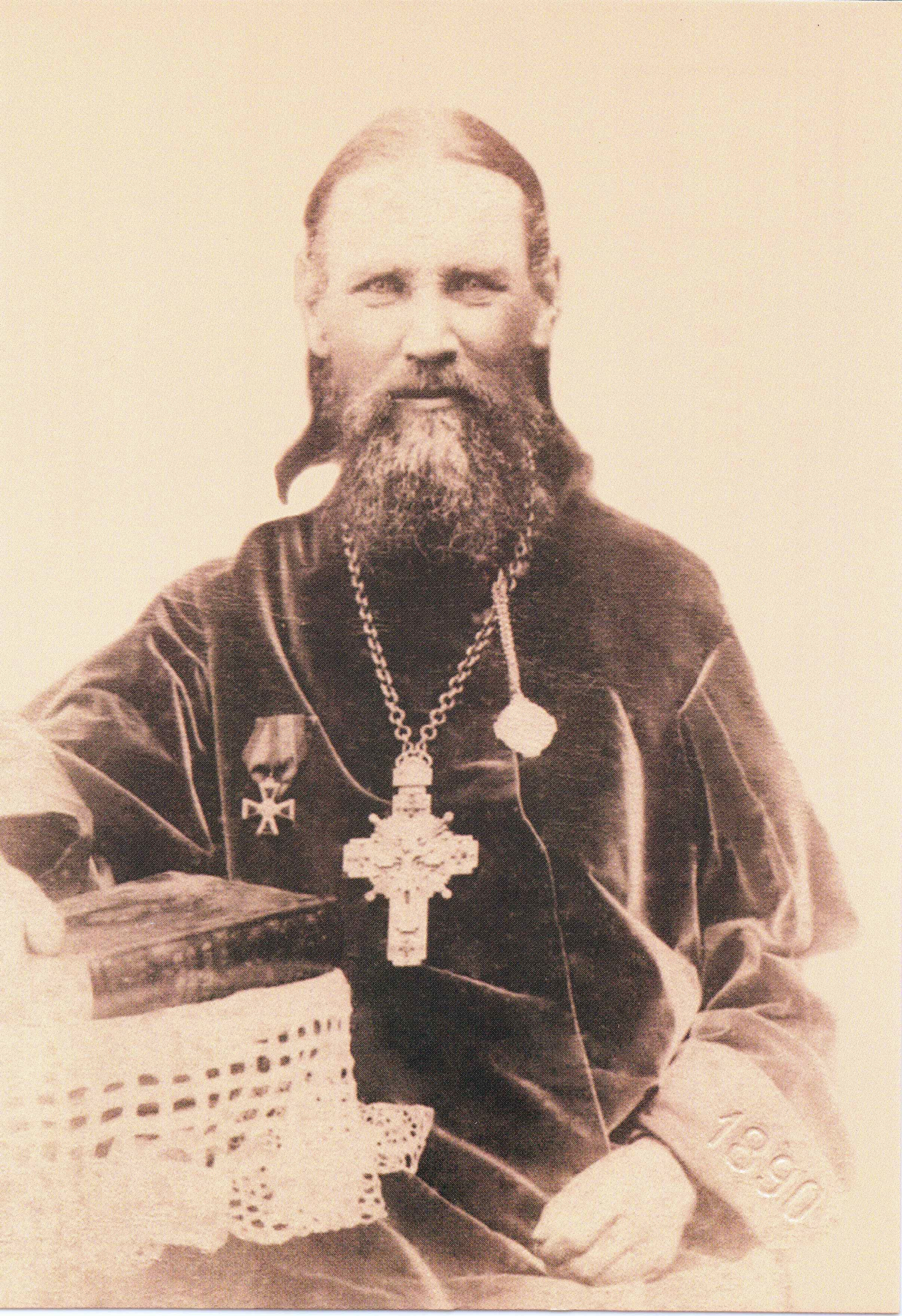 Saint John of Kronstadt. 1890